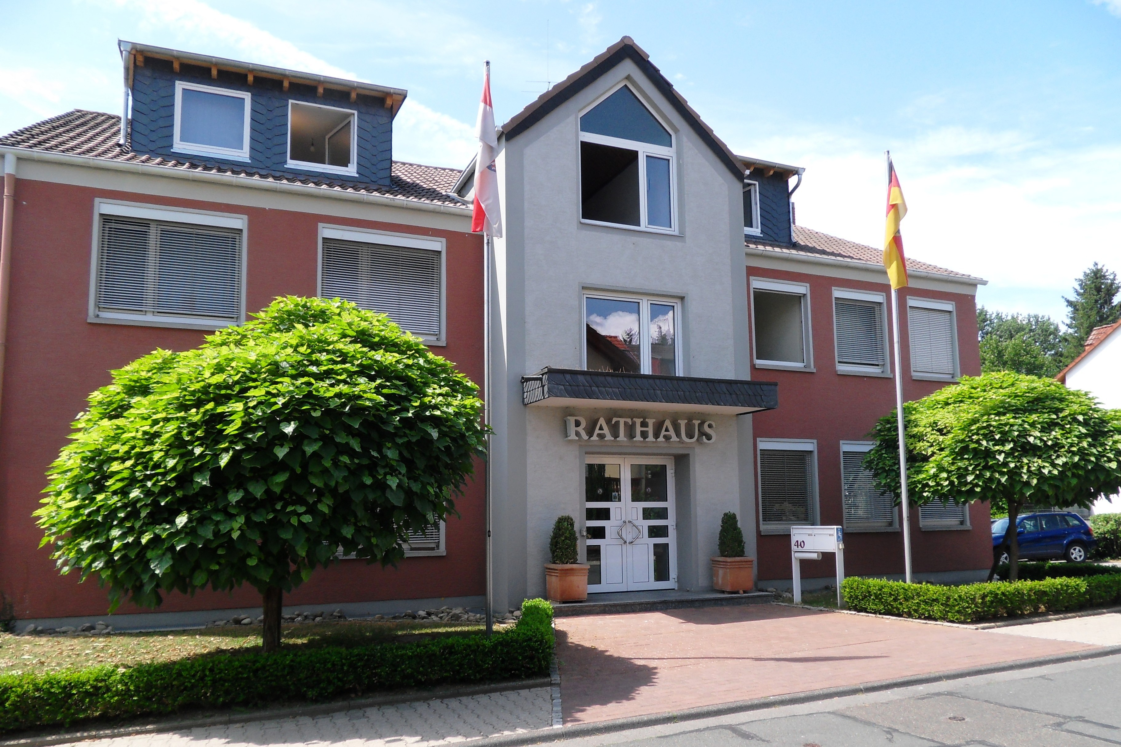 Rathaus von Walluf in der Mühlstraße 40, an der Grenze zwischen Nieder- und Oberwalluf.